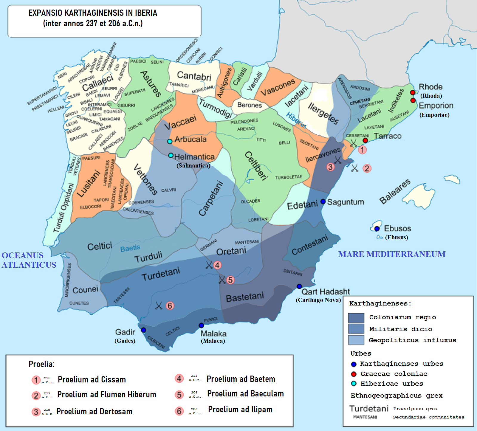 Iberia inter annos 237 et 206 a.C.n.